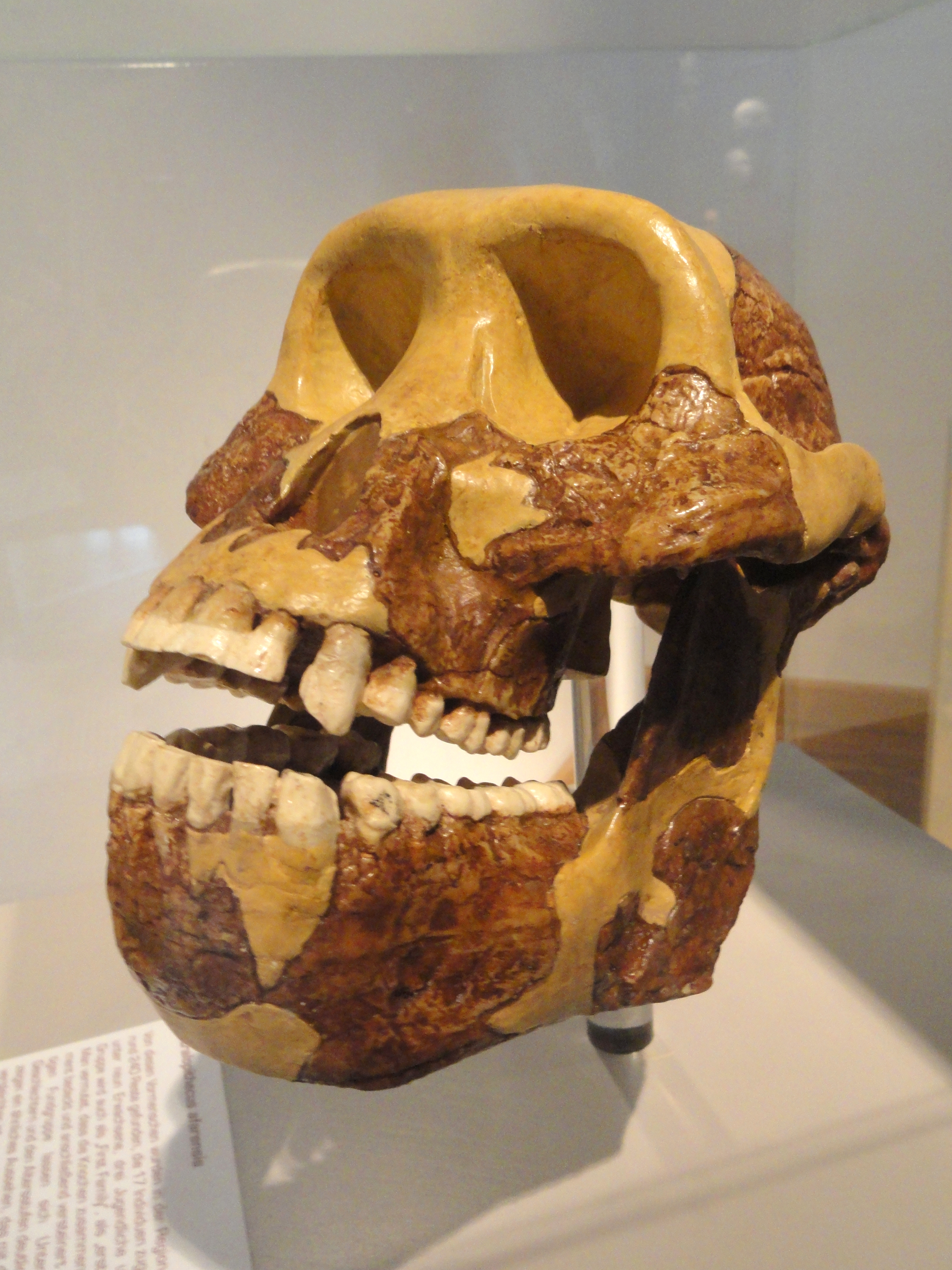 Exhibit in Naturmuseum Senckenberg, Frankfurt am Main, Germany.